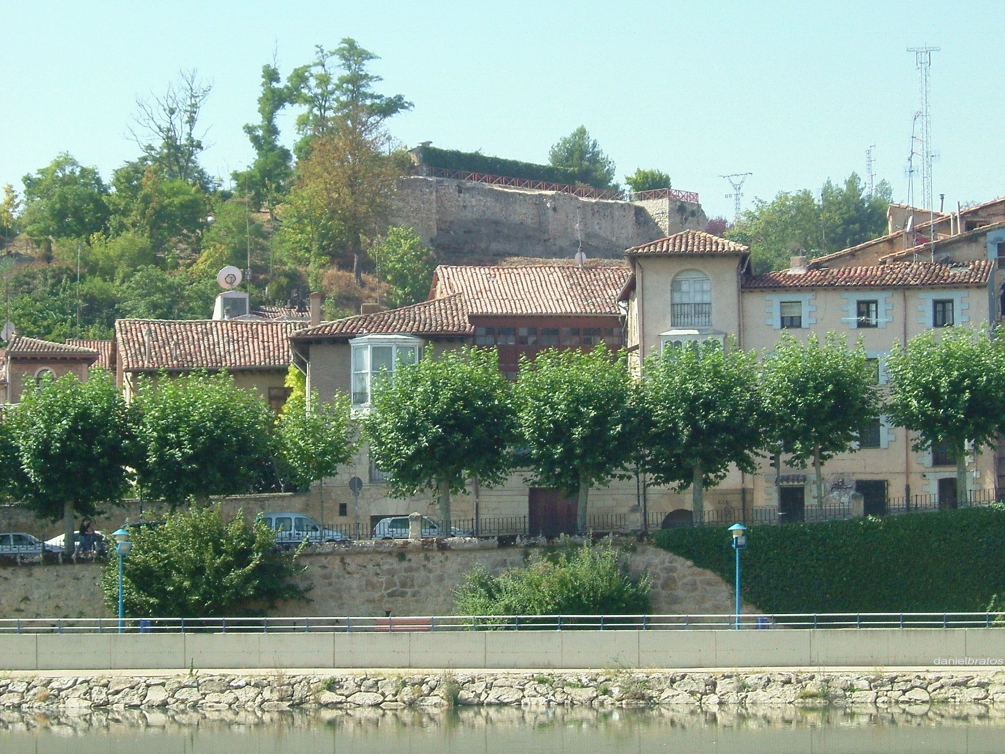 Vista del castillo de Miranda de Ebro